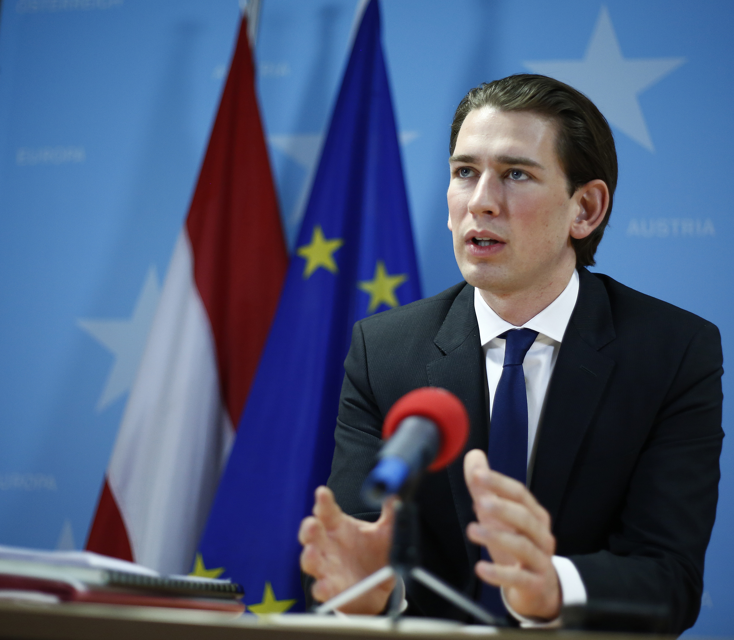 Rat für Auswärtige Angelegenheiten in Brüssel. Außenminister Sebastian Kurz im Gespräch mit Journalisten im Rahmen einer Pressekonferenz. 20.01.2014, Brüssel, Foto: Dragan Tatic